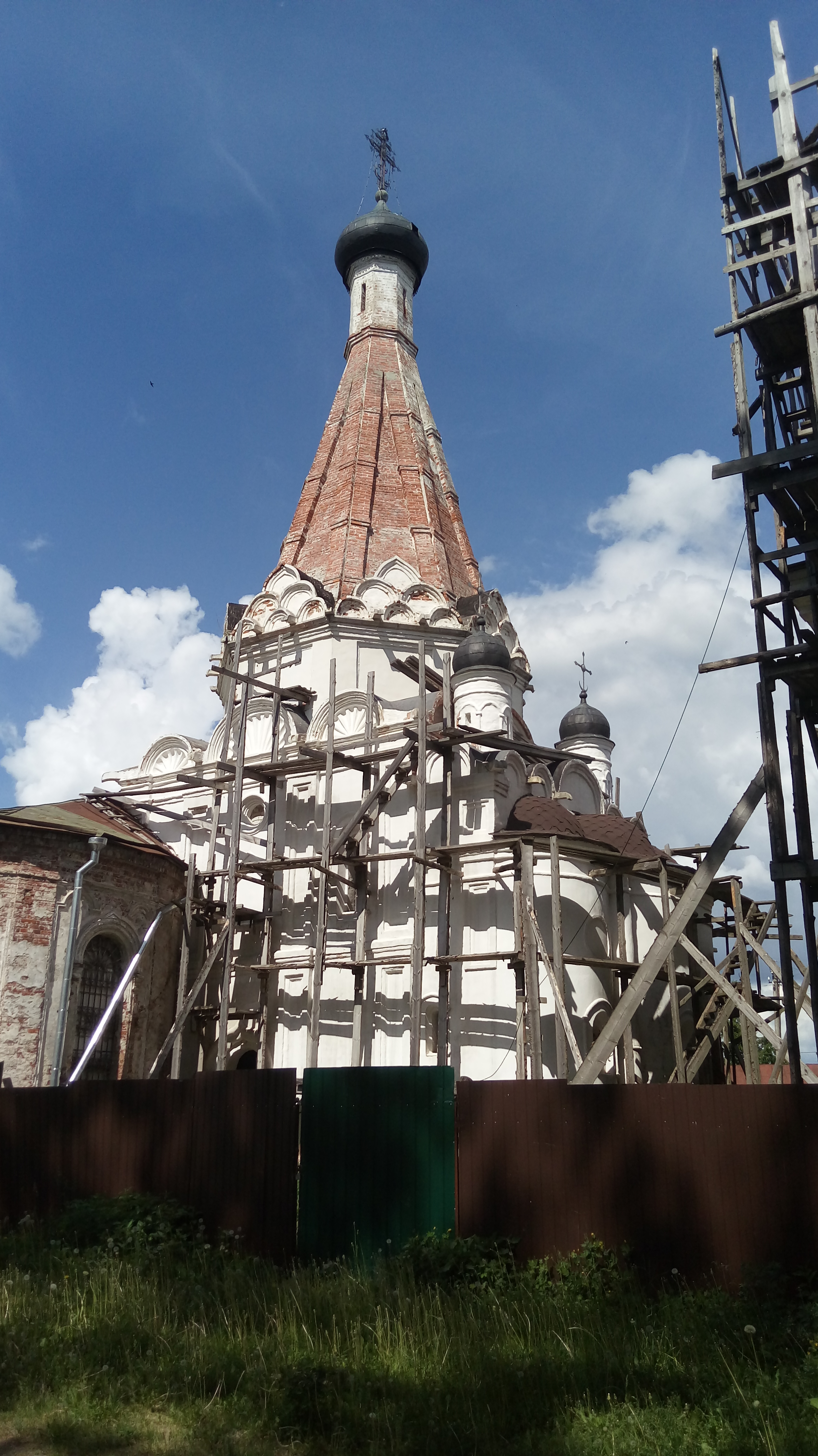 Церковь Одигитрии (Смоленская): Кушалино, Рамешковский район, Тверская область